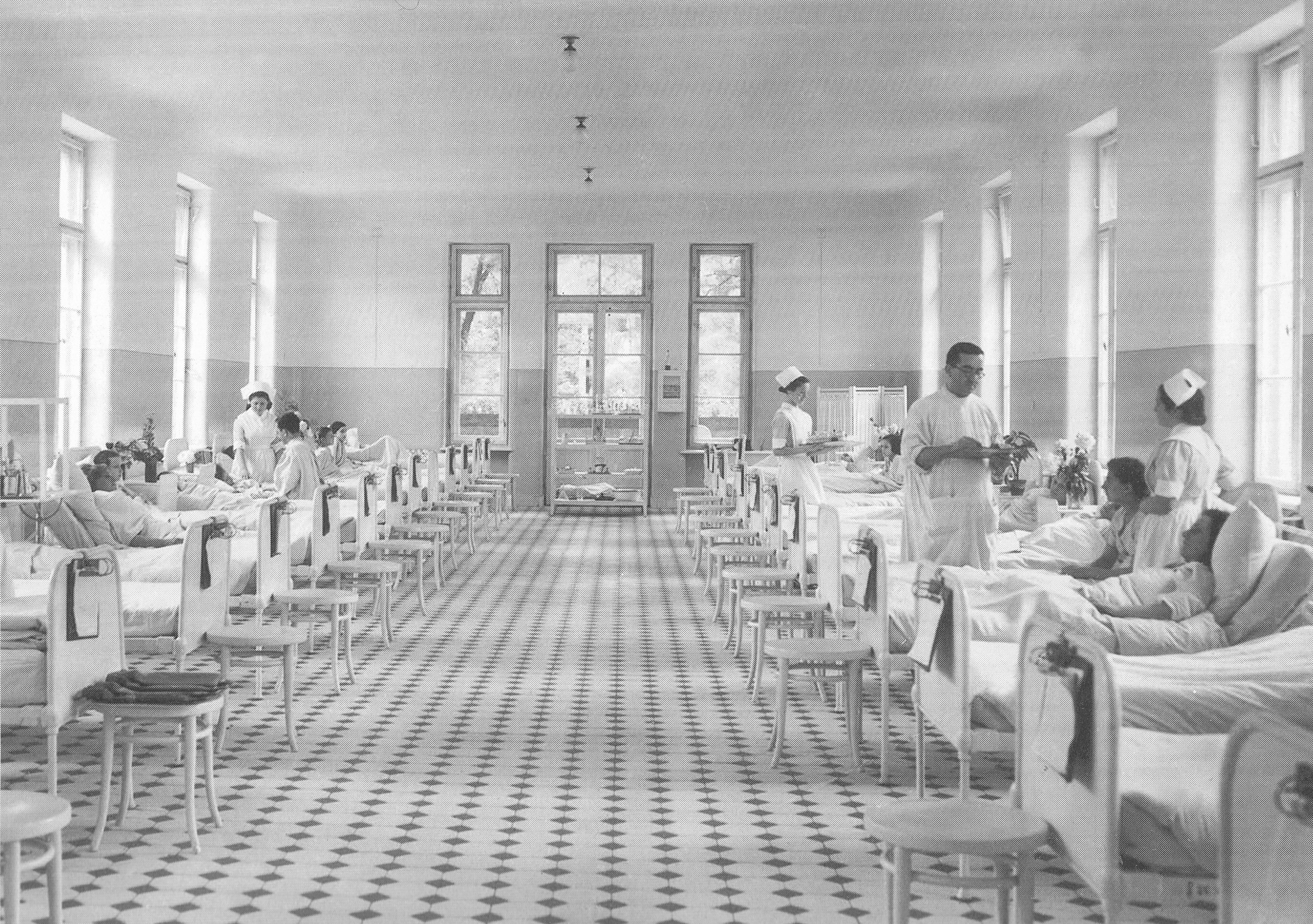 Szpital na Czystem w Warszawie